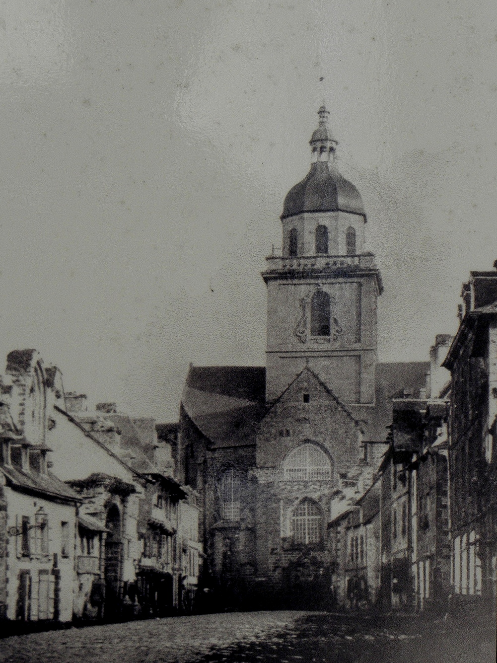 L'abbatiale Sainte-Croix de Quimperlé avant 1862.